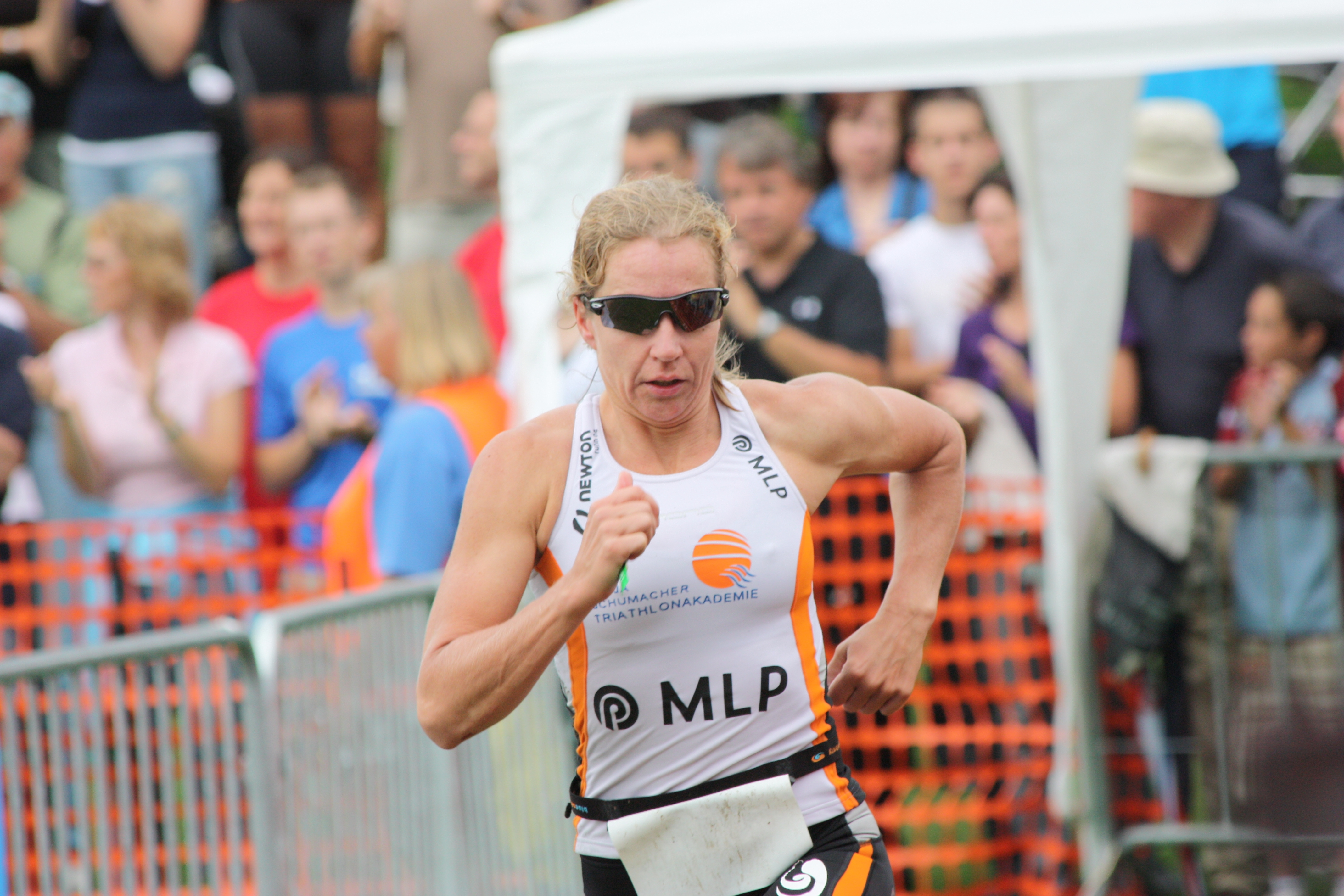 Katja Schumacher am 2.8.2009 beim Heidelbergman Triathlon